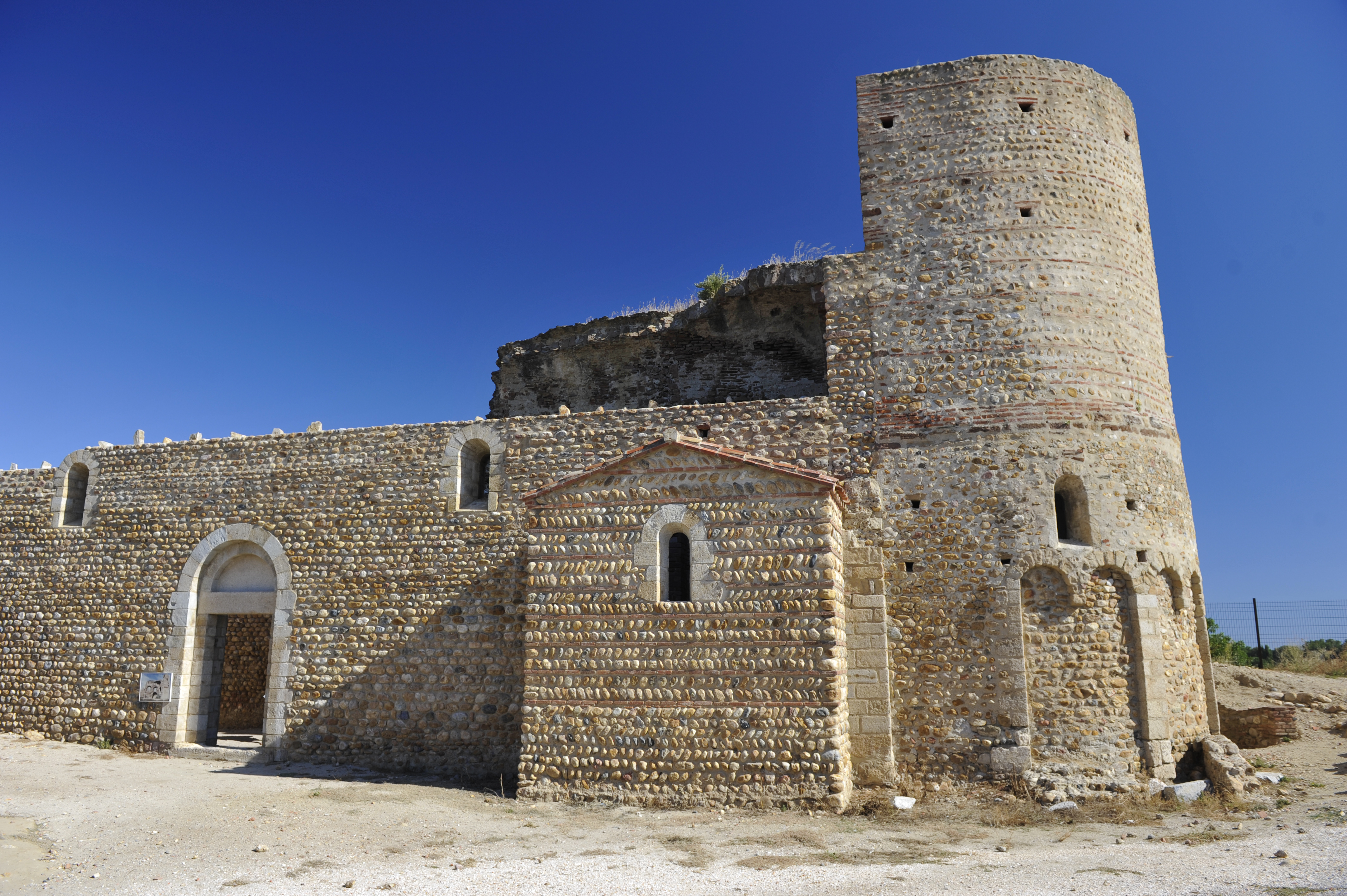 Chapelle Saint-Martin au château de Canet-en-Roussillon